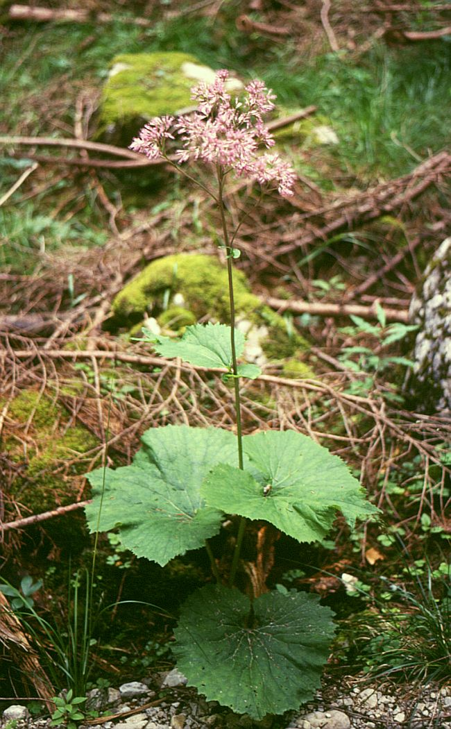 Grau-Alpendost (Adenostyles alliariae), Korbblütler (Asteraceae) - Österreich/Austria/Autriche: Niederösterreich, Oberes Ybbstal, „Auf den Mösern“ SW Neuhaus